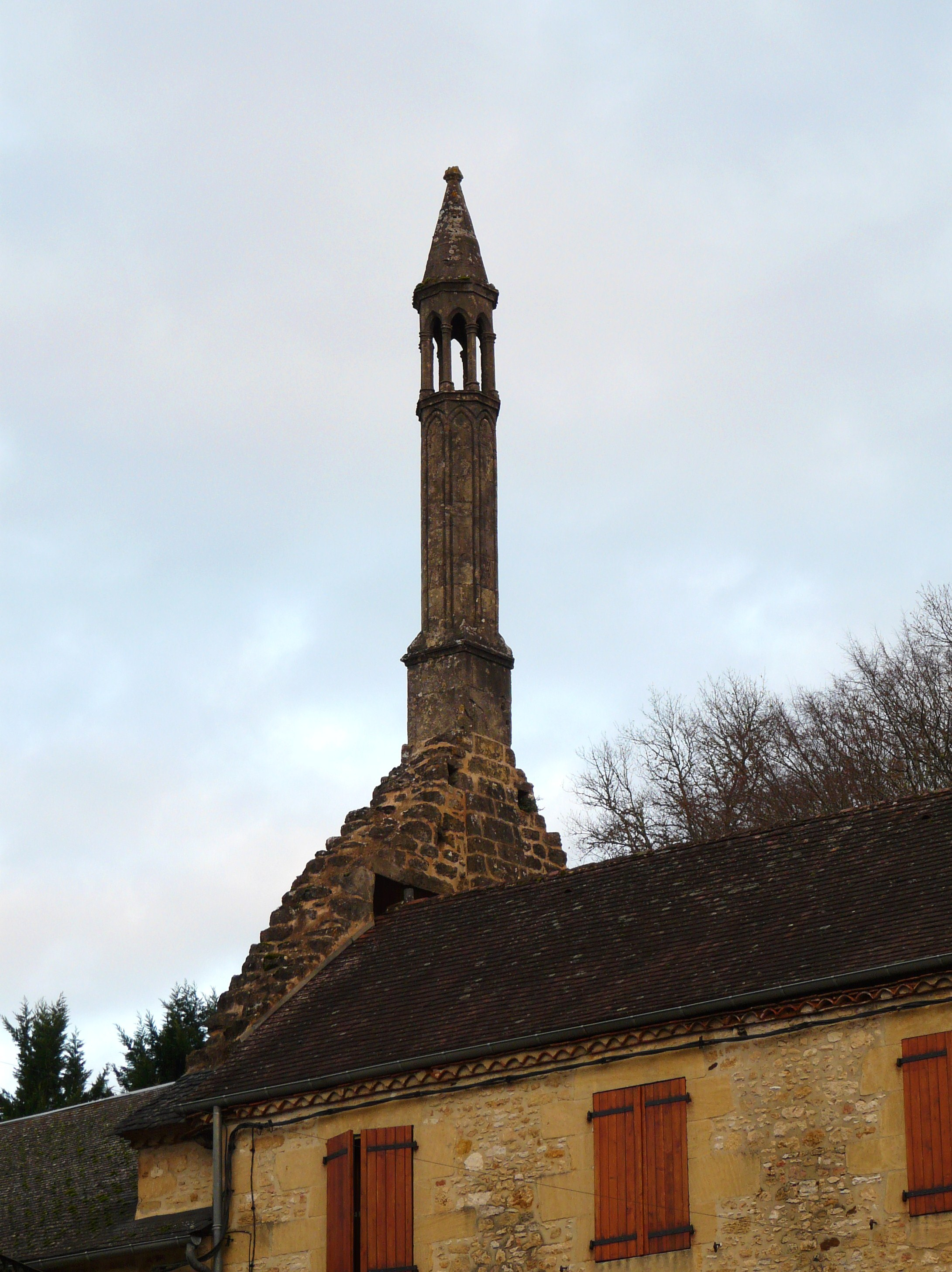 Cheminée gothique sur une maison à Carlux, Dordogne, France